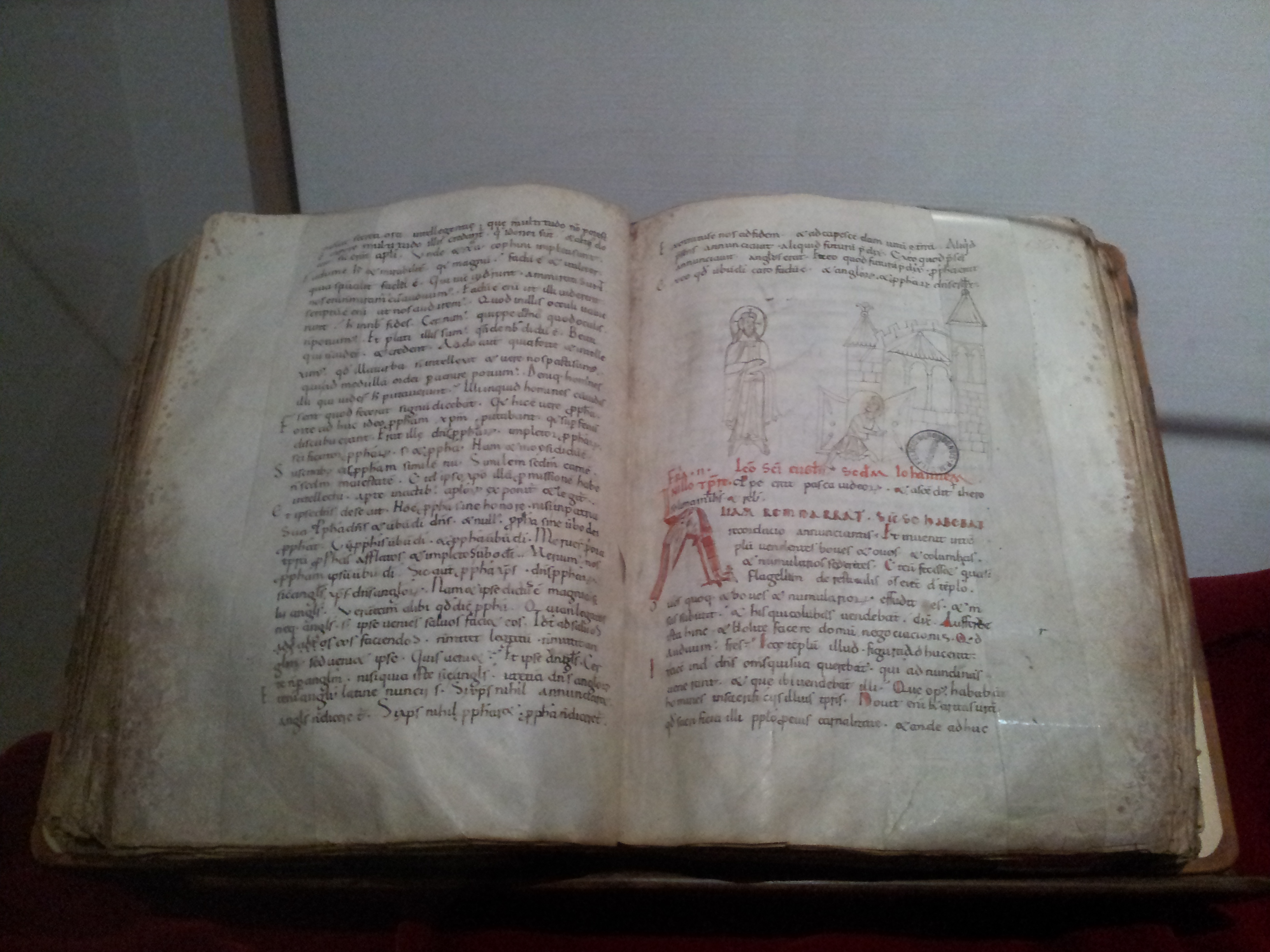 Llibre miniat en pergamí.